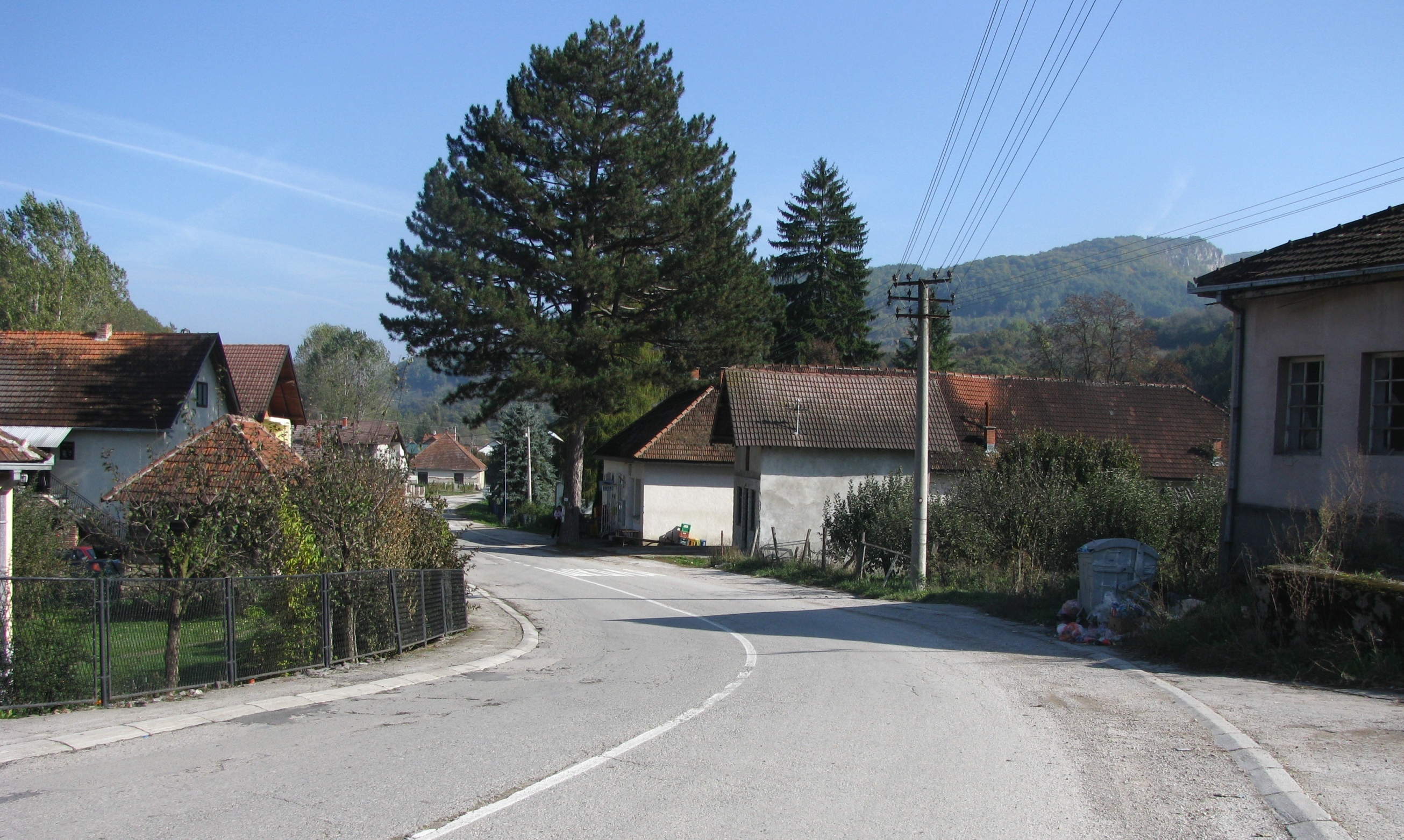 Главна улица у Сечој Реци.